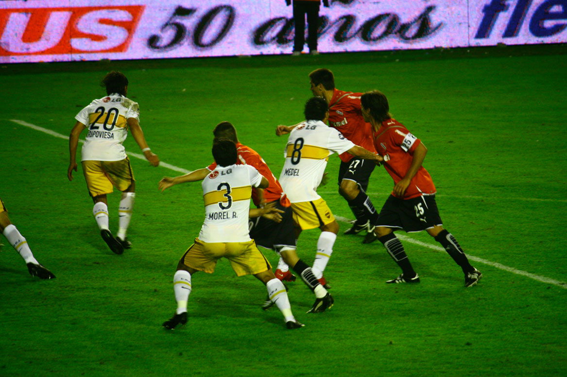 Partido entre Boca Juniors (Morel Rodríguez, Medel y krupoviesa) e Independiente, en "La Bombonera" en 2010.